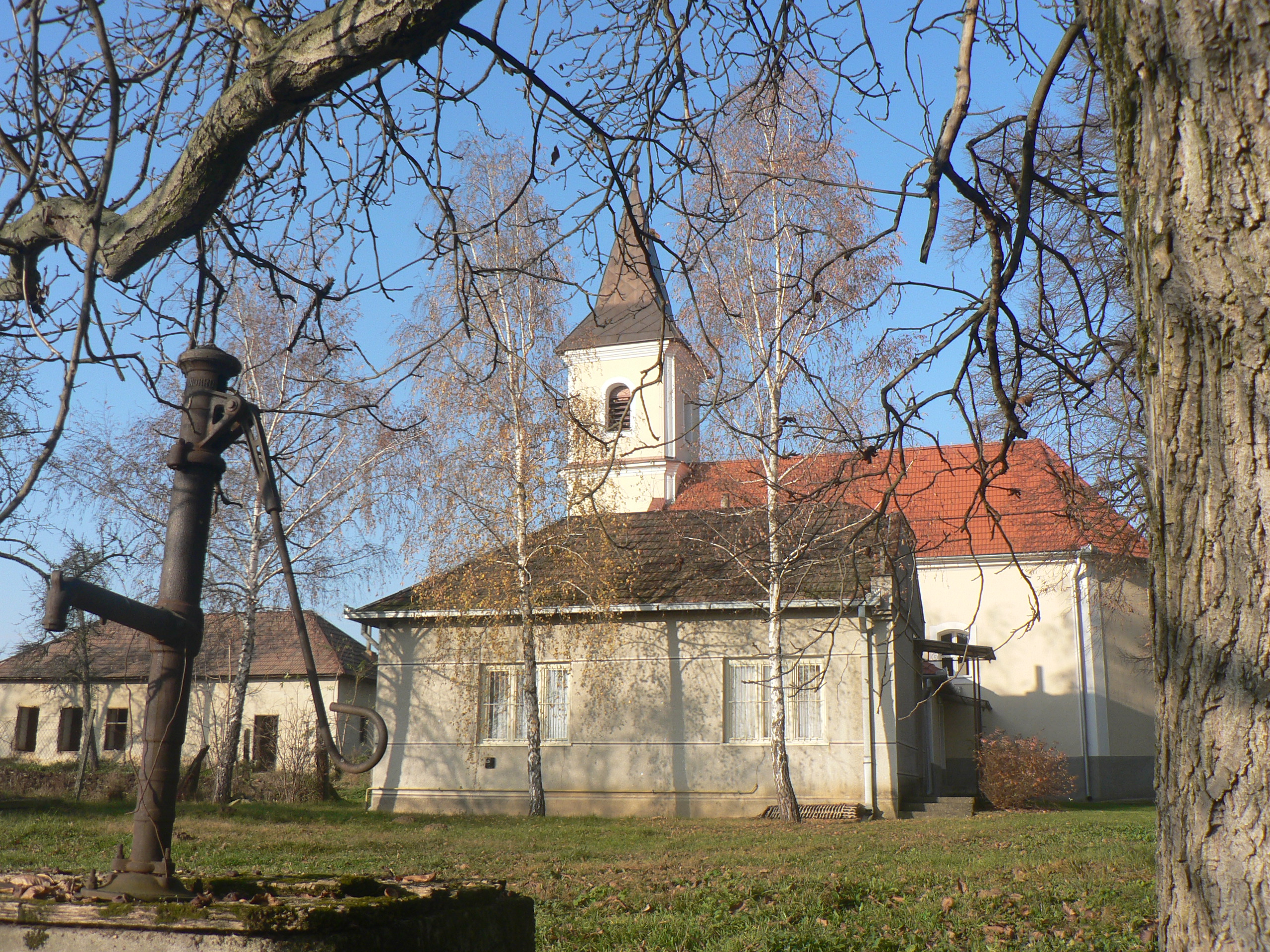 A farnadi református templom (Szlovákia)